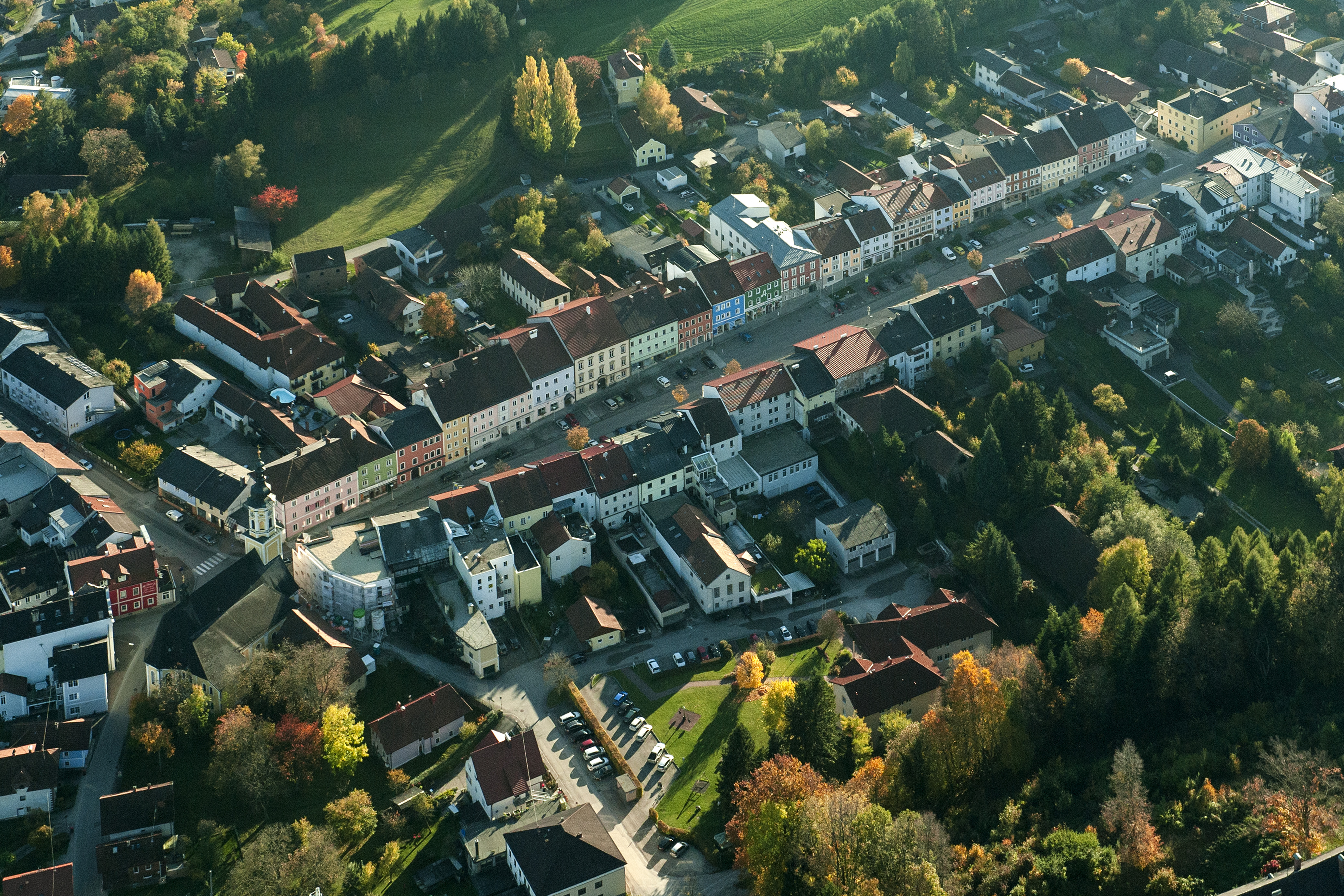 Markplatz